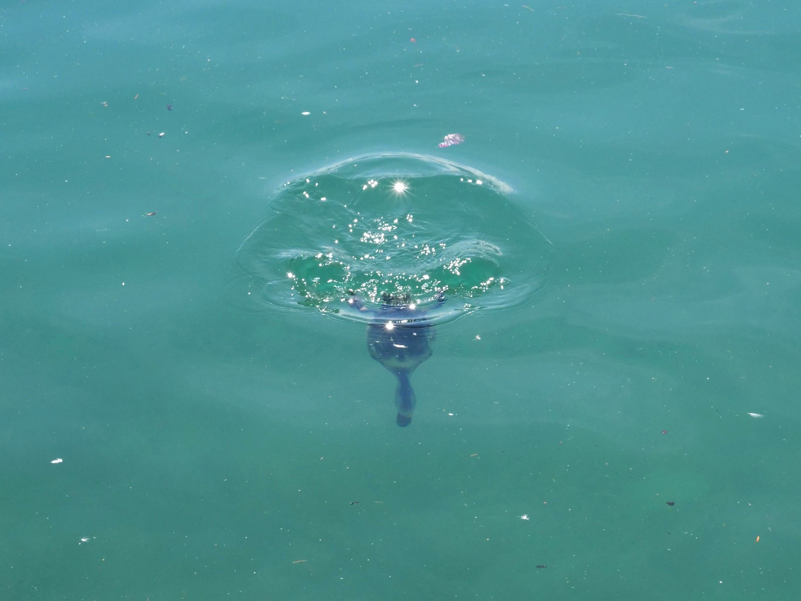 Reiherente beim Abtauchen, die Wasser verdrängt und so eine Delle auf der Wasseroberfläche erzeugt hat.